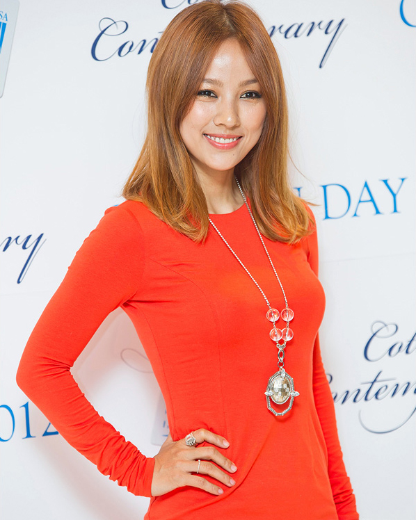 이효리. 미국면화협회 주최 '코튼데이 2012' 홍보대사.